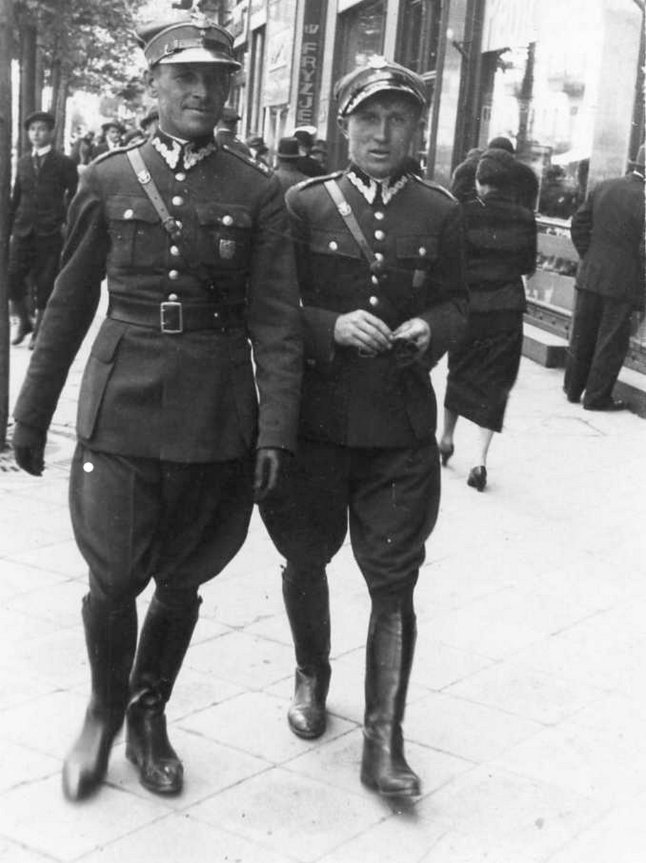 Podporucznicy w korpusie piechoty (1933 r.)